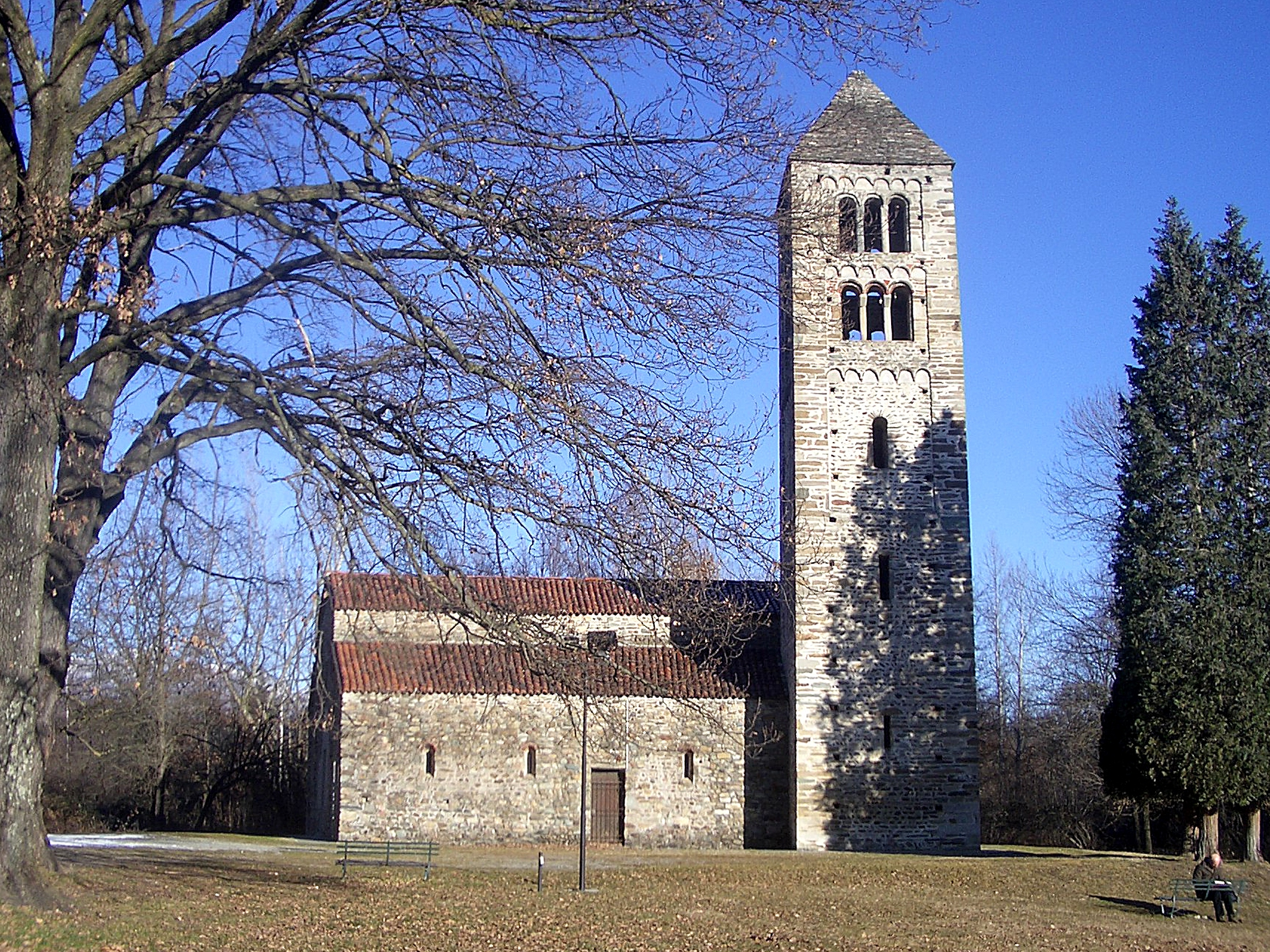 San Secondo church, XI century, Magnano, Biella, Italy